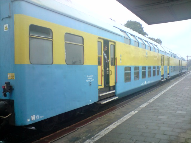 Bipa tuż przed odjazdem ze stacji Czersk